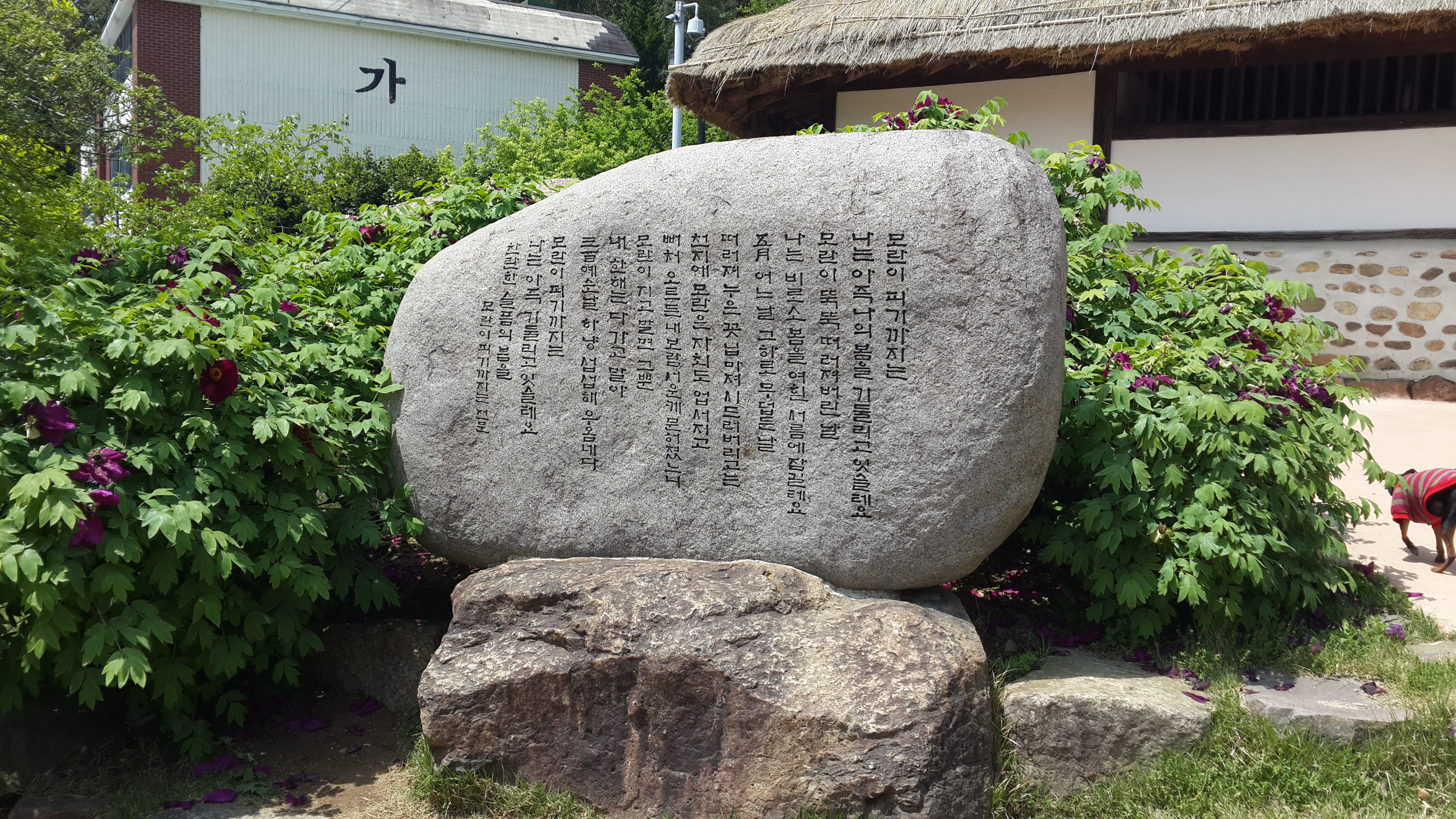 김영랑 시인 생가 앞의 모란이 피기까지는 시비